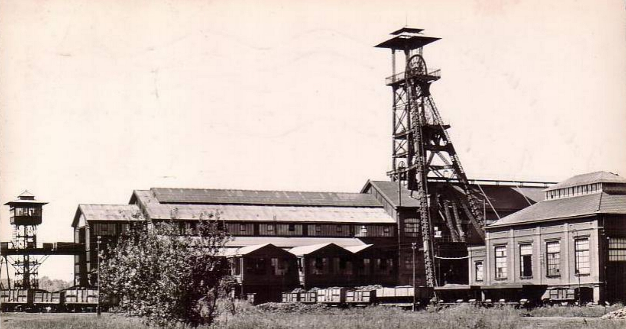 La fosse Sabatier de la Compagnie des mines d'Anzin était un charbonnage constitué de deux puits situé à Raismes, Nord, Nord-Pas-de-Calais, France.